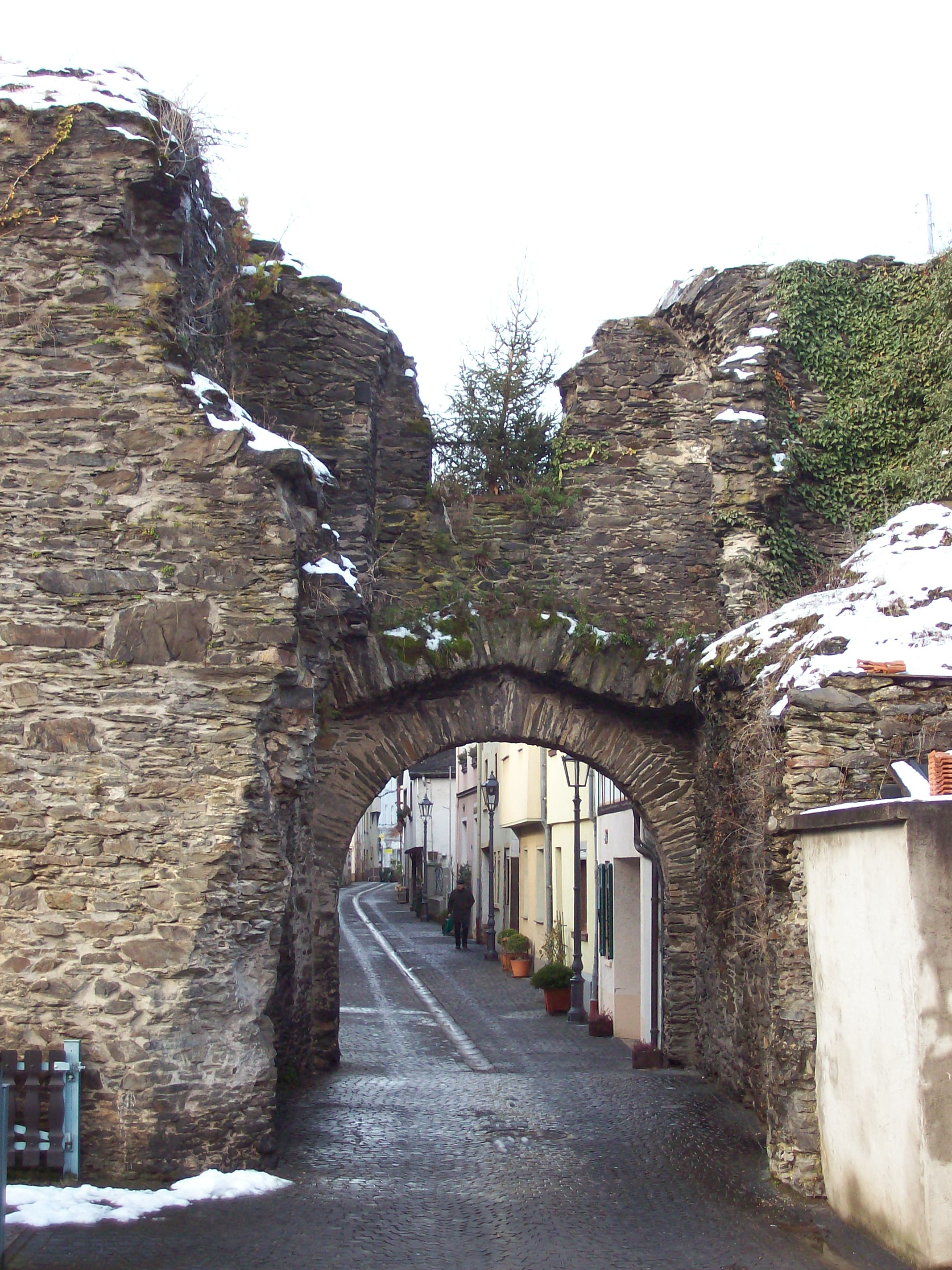 Das Binger Tor der mittelalterlichen Stadtbefestigung von Boppard; Es wurde die stadtauswärts liegende Ostseite des Tors Fotografiert.